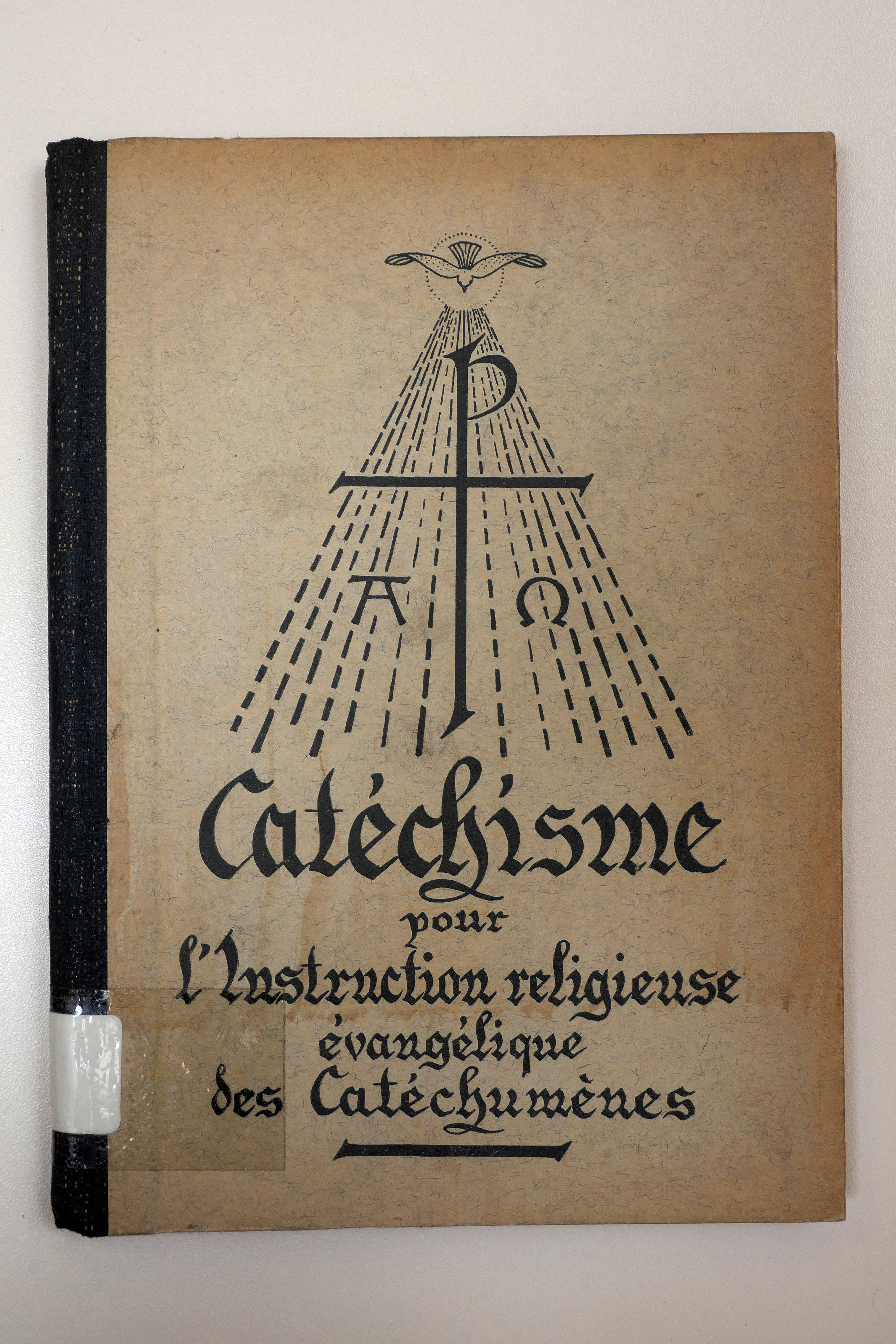 Catéchisme pour l'instruction religieuse évangélique des catéchumènes, publié par la Conférence pastorale de Strasbourg. Saverne : Imprimerie Savernoise (n'existe plus), 1939, 116 p., 18,5 cm. Médiathèque protestante de Strasbourg. Cote : A Va 0132